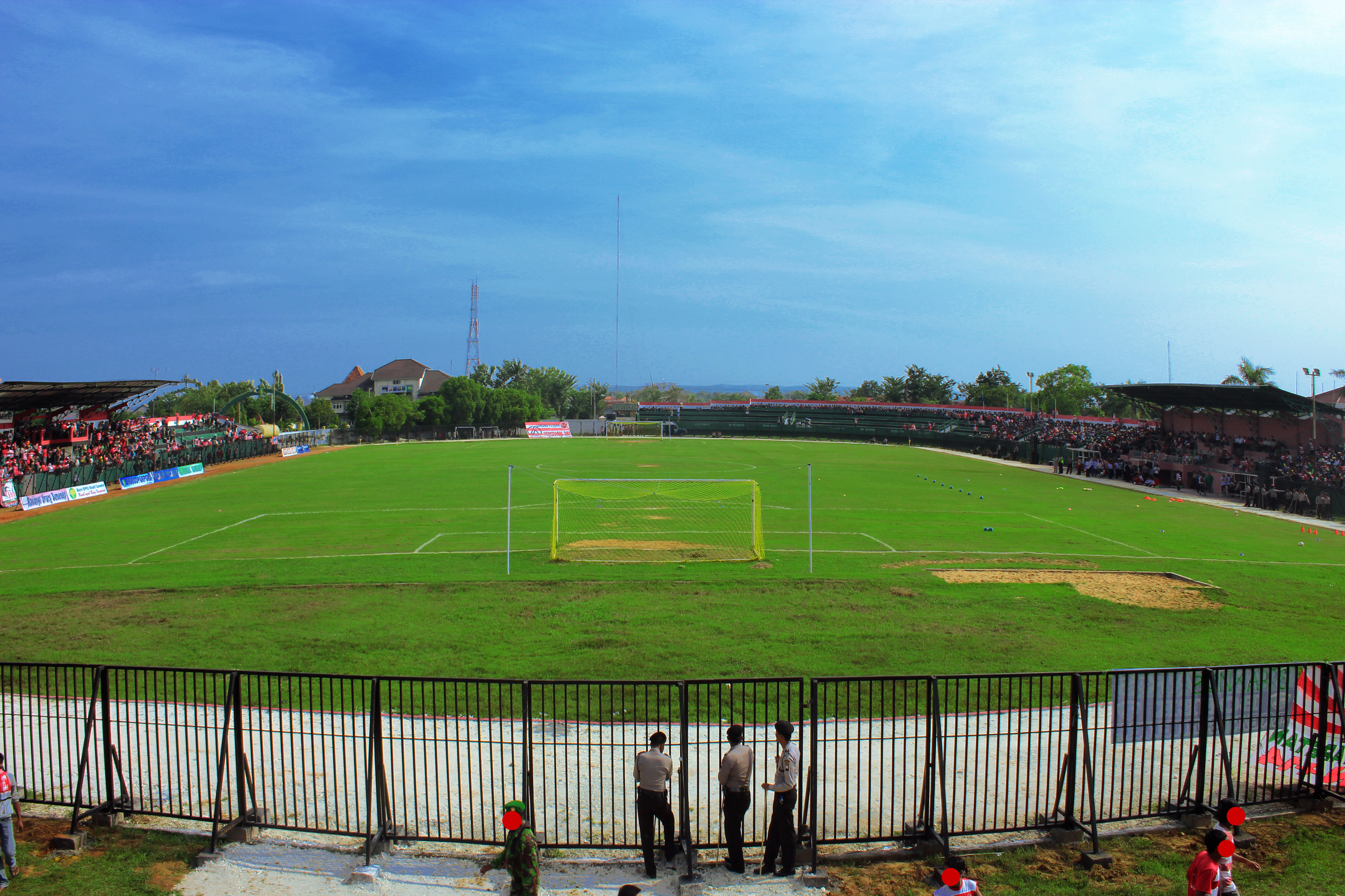 Stadion Ahmad Yani